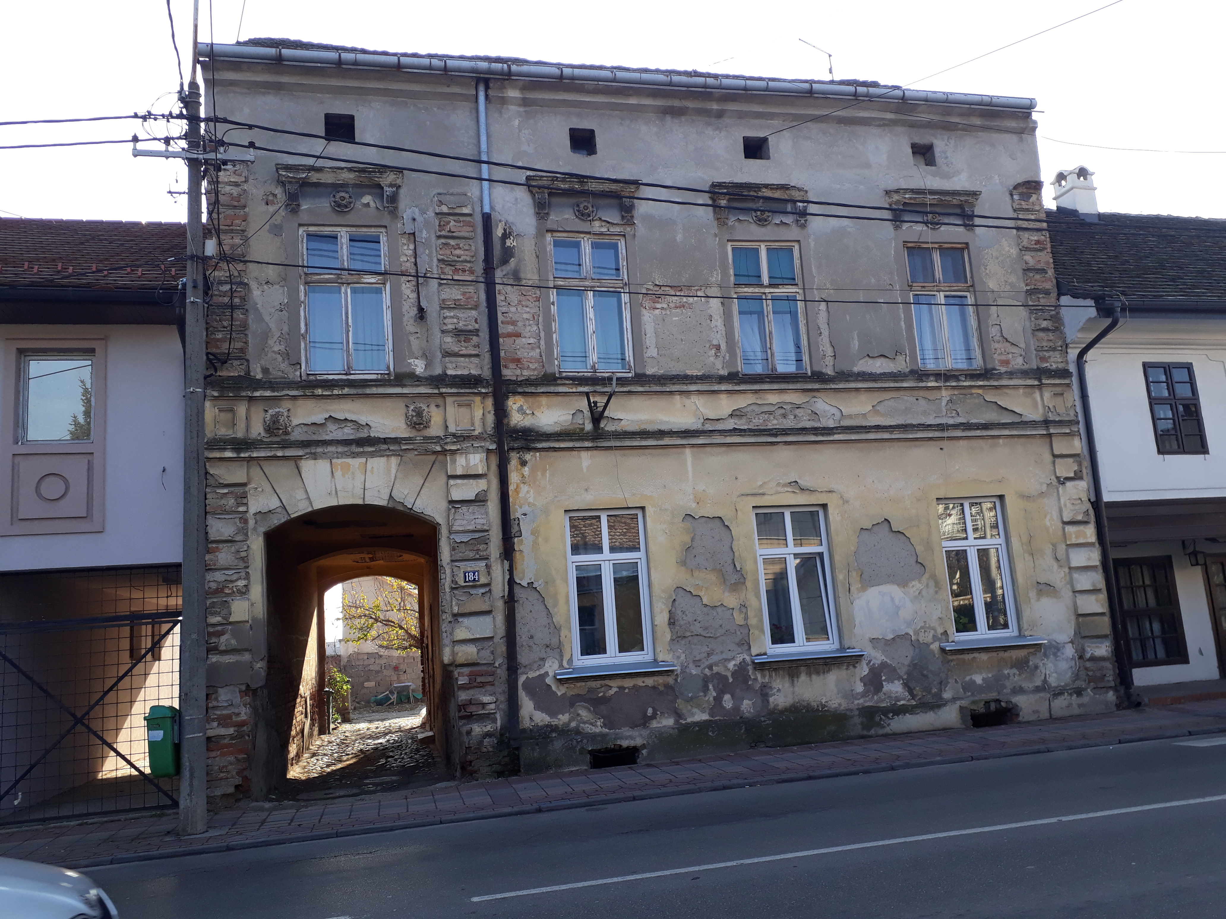 Stara varoška kuća u Obrenovcu